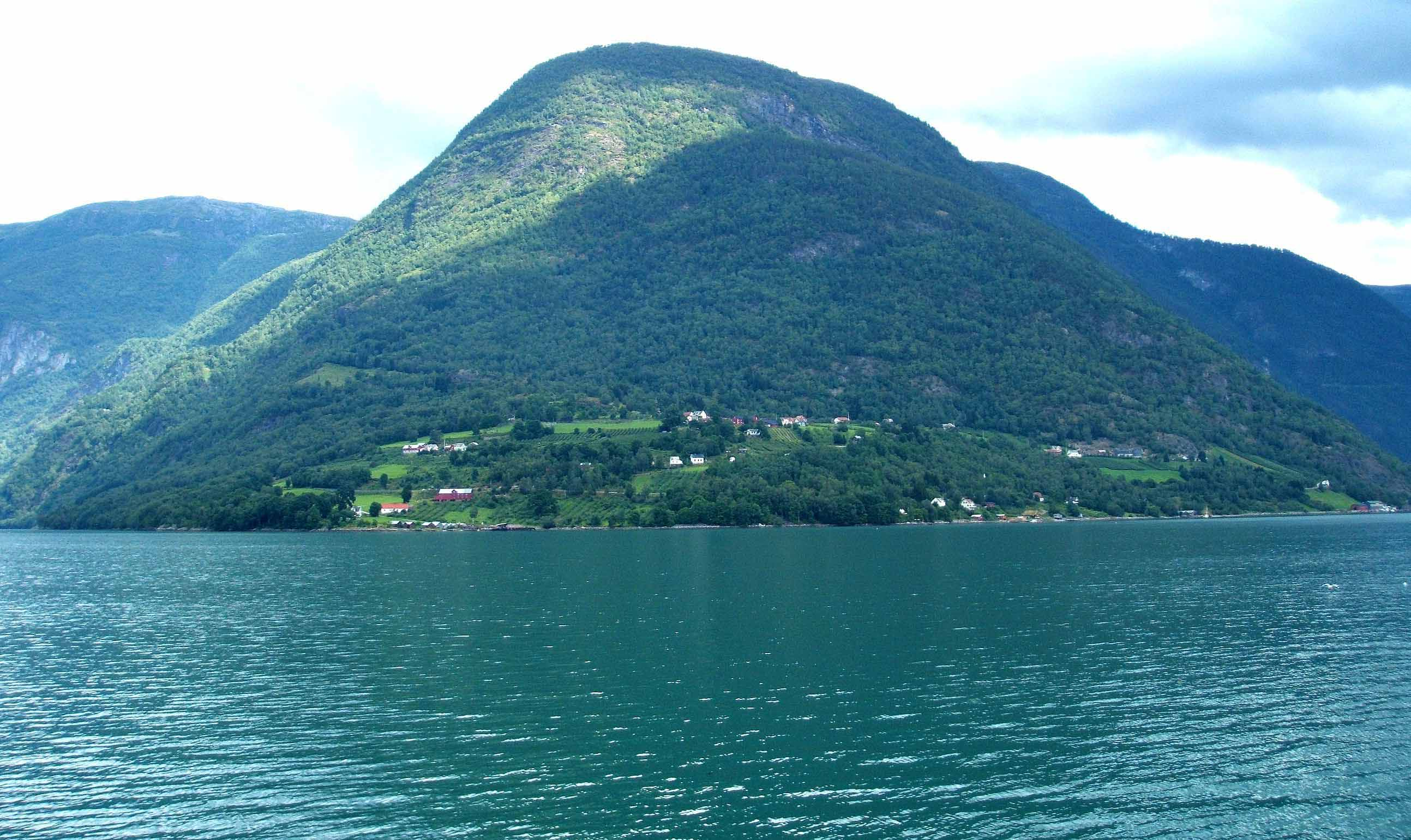 Urnes in Lustrafjorden (arm of the Sognefjord).Urnes is known for its famous stave church called Urnes stave church. Norwegian: Urnes/ornes (lokal uttale oddnes) ligg på østsida av Lustrafjorden som er lengste armen til Sognefjorden.På motsatt side av fjorden ligg Solvorn, begge tilhøyrer Luster kommune i Sogn og Fjordane fylke.Til Urnes kjem du enten med ferje fra Solvorn eller fylkesveg 331 fra Skjolden.